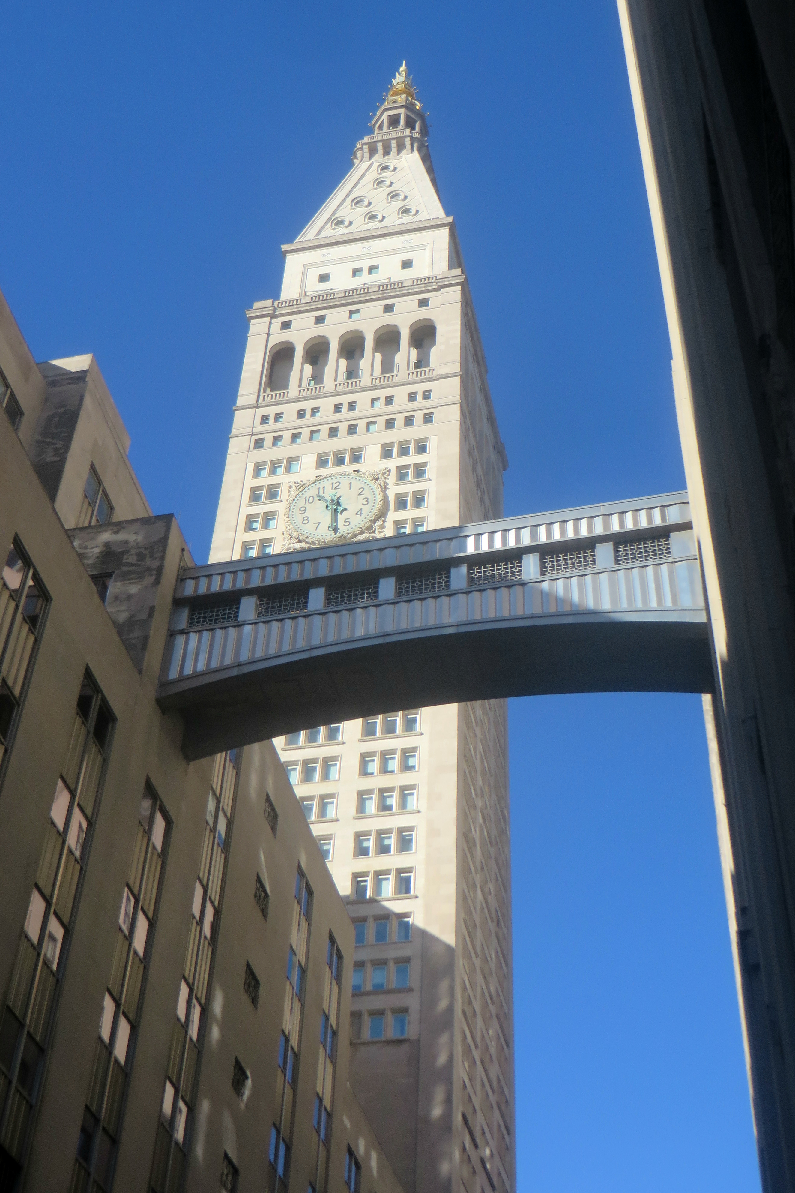 Met Life Skybridge